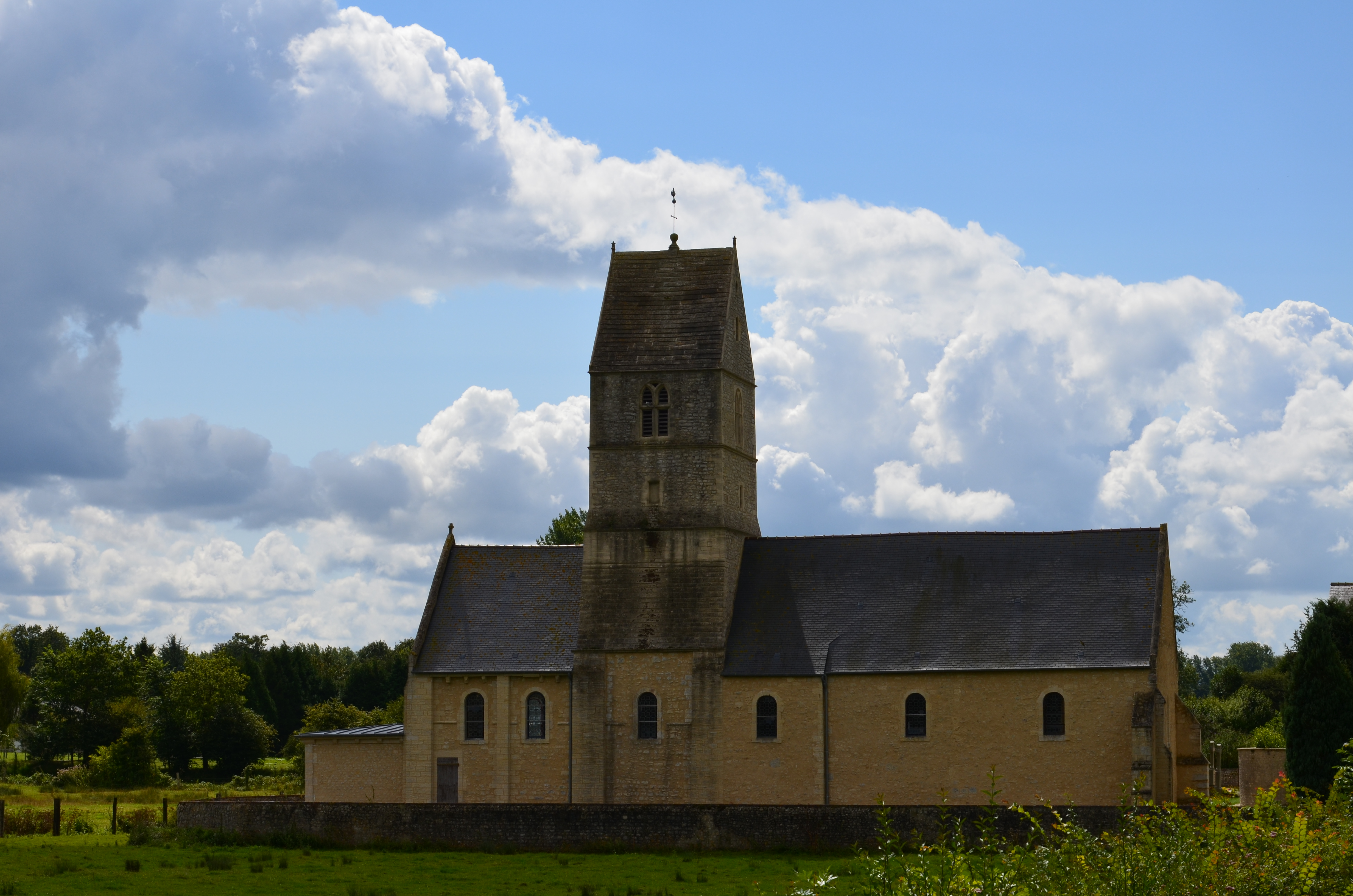 Église Saint-Germain de Saonnet.